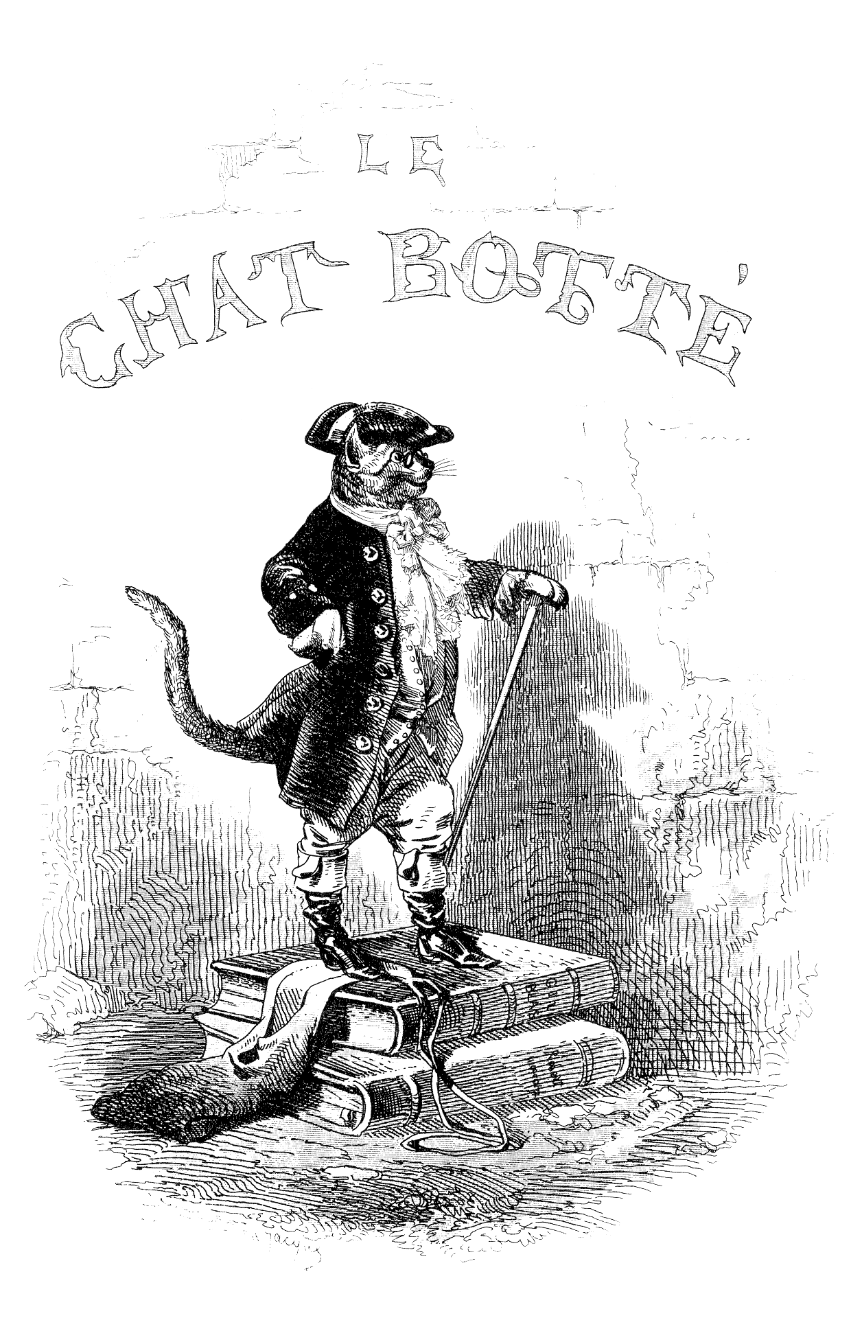 Couverture des Contes du temps passé de 1843, édition L. Curmer de 1843 ; illustrée par Pauquet, Marvy, Jeanron, Jacque, Beaucé ; texte gravé par Blanchard.